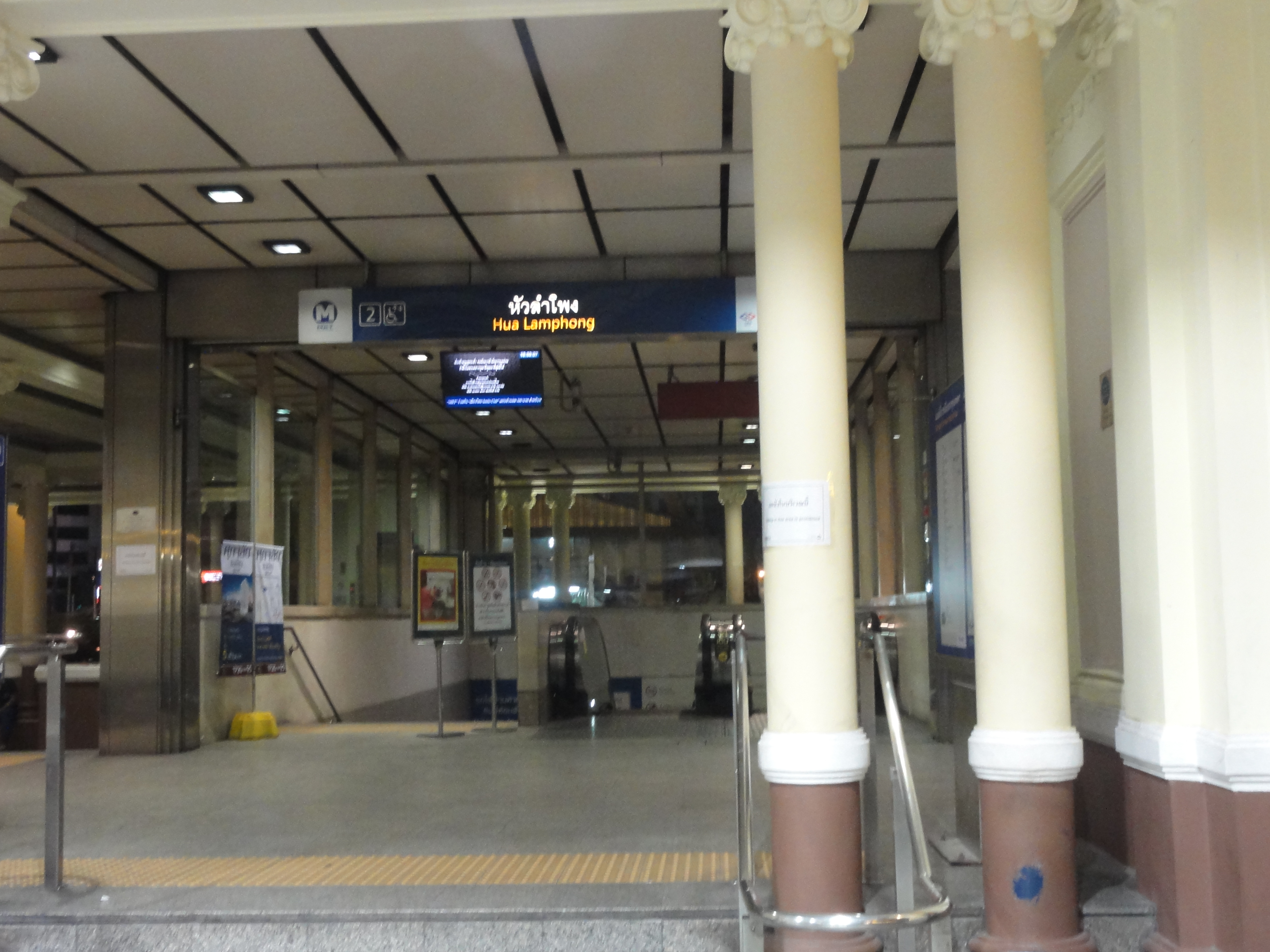 Hua Lamphong MRT Station